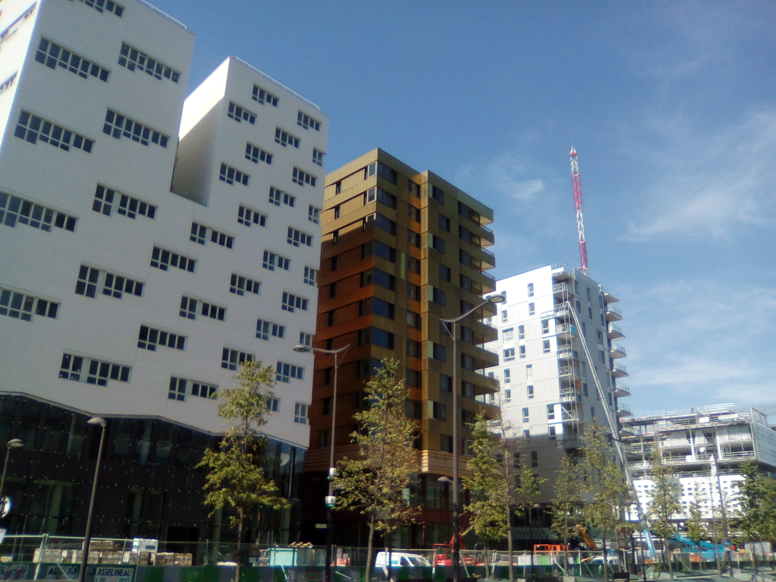 Avenue de France, à Paris 13e.